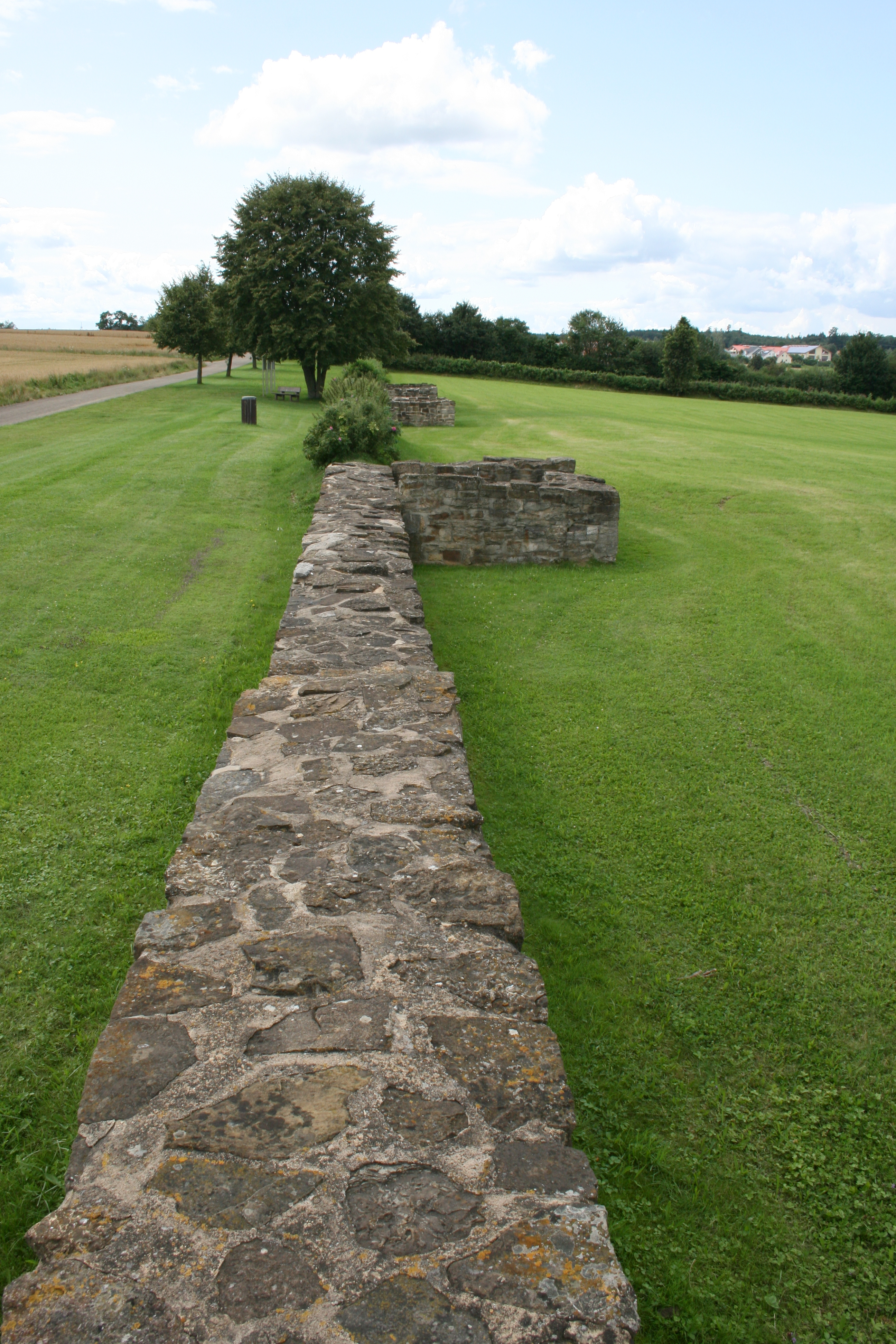 Kastell Buch, Blick entlang des rekonstruierten südlichen Mauerabschnitts mit Mauerturm.